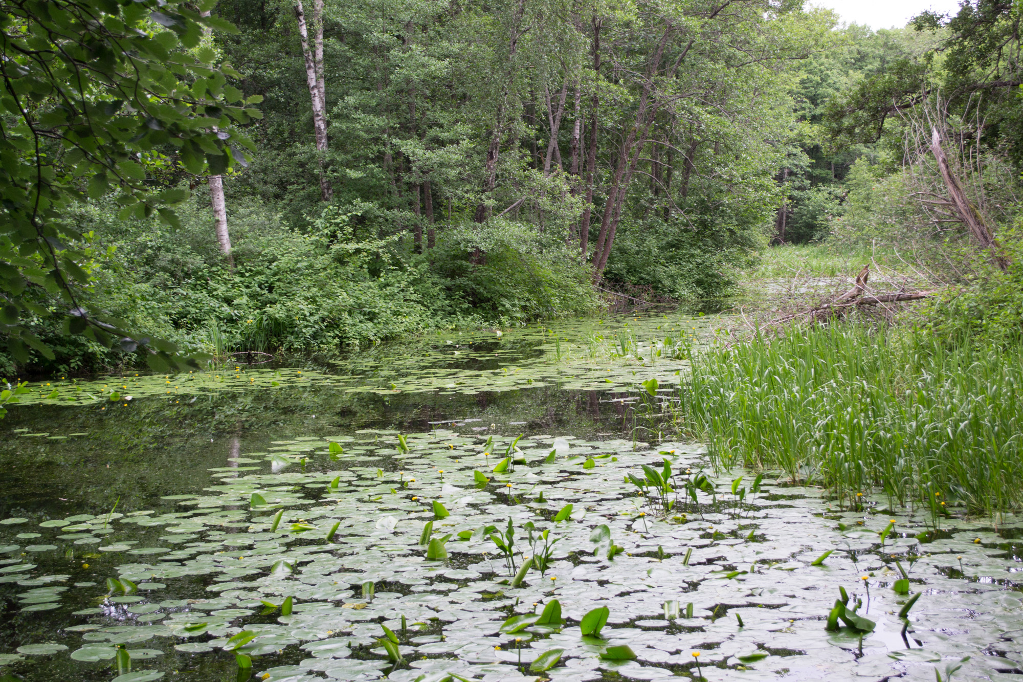 Rosenfors-48